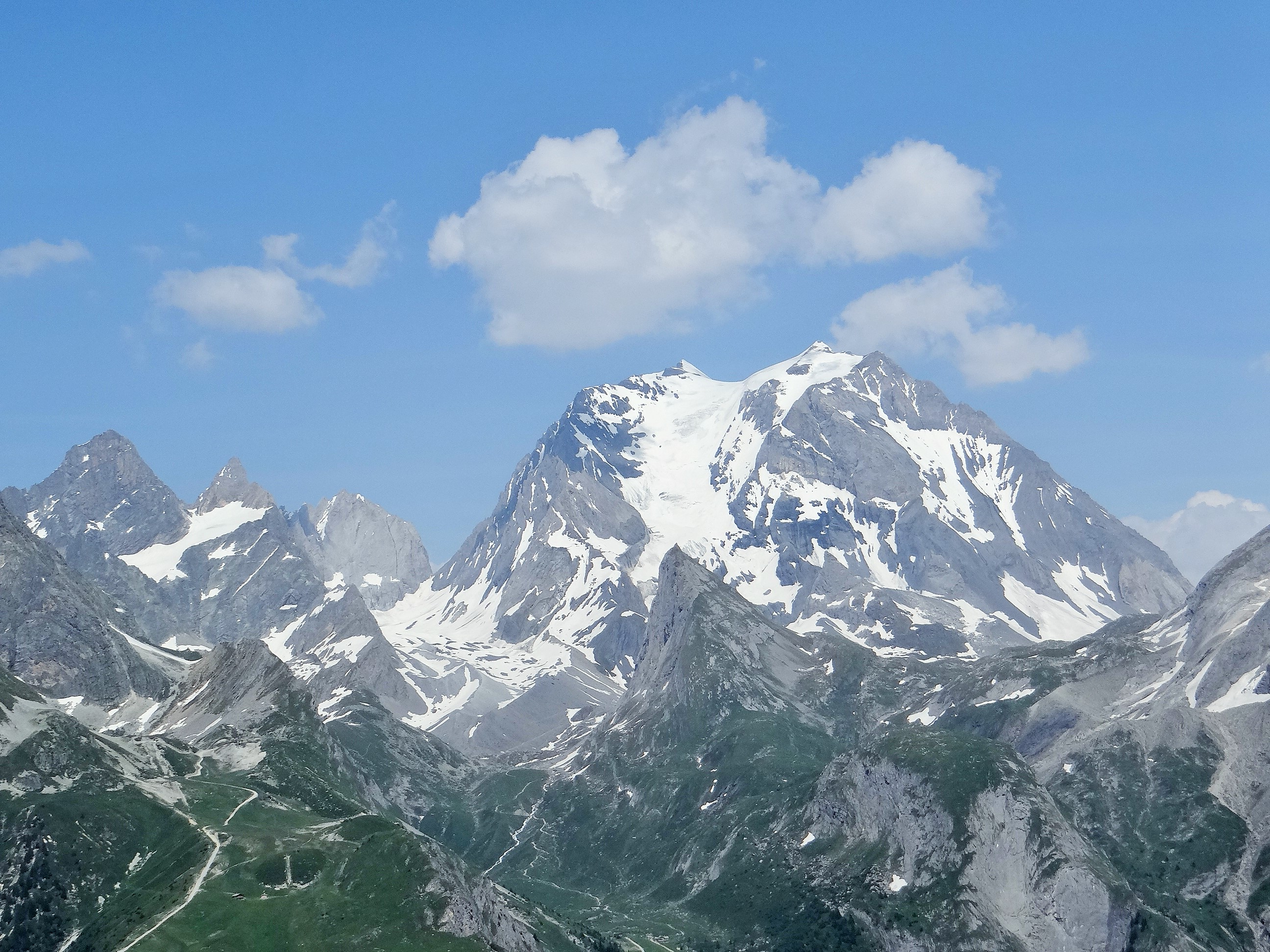 Grande Casse (3855m)